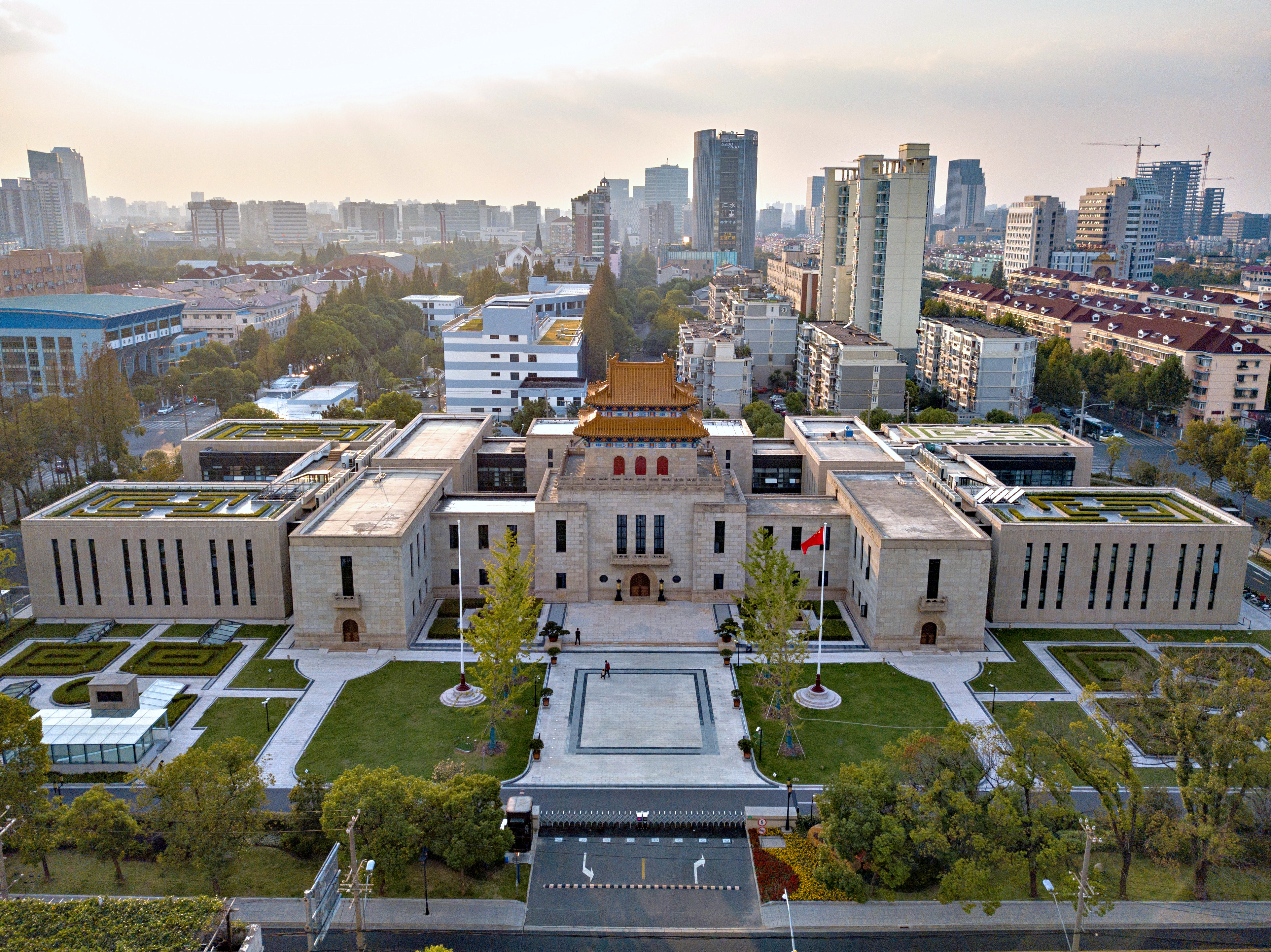 中文（中国大陆）: 上海市立图书馆·杨浦区图书馆·航拍正立面